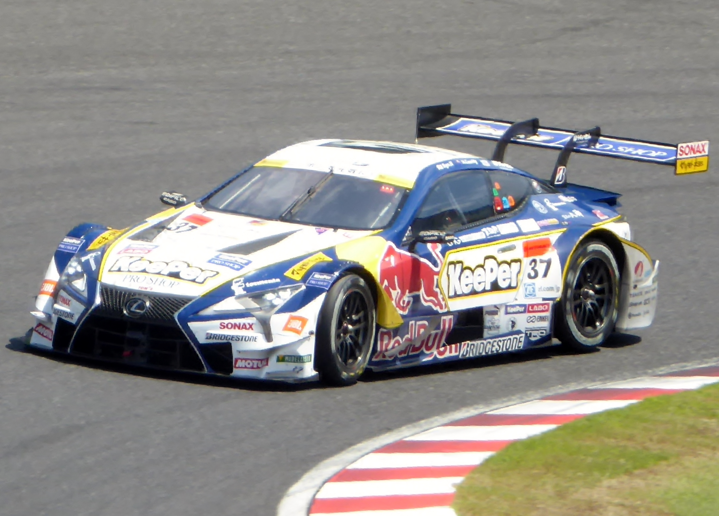 2017年鈴鹿1000㎞に於いて37号車KeePer TOM'S LC500を撮影。